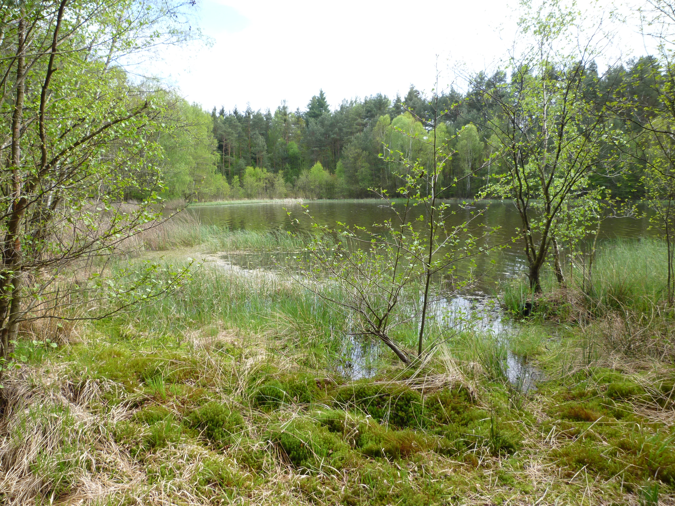 Uferbereich des Neubäuer See mit Waldgebiet. Naturschutzgebiet im Oberen Bayerischen Wald.